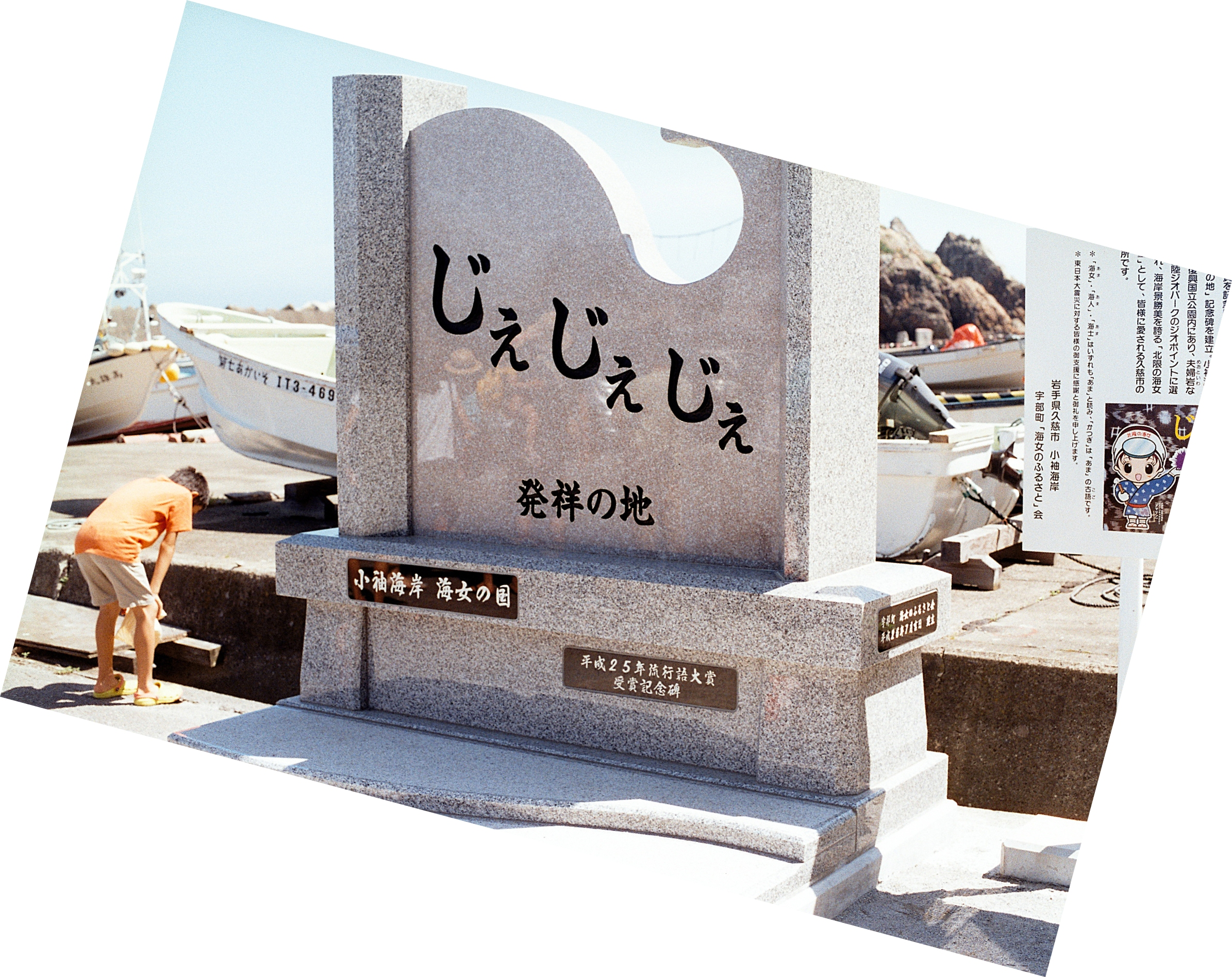 2015/08/09 平成 25 年流行語大賞：じぇじぇじぇ Nikon FM2 / 50mm AGFA VISTAPlus ISO400